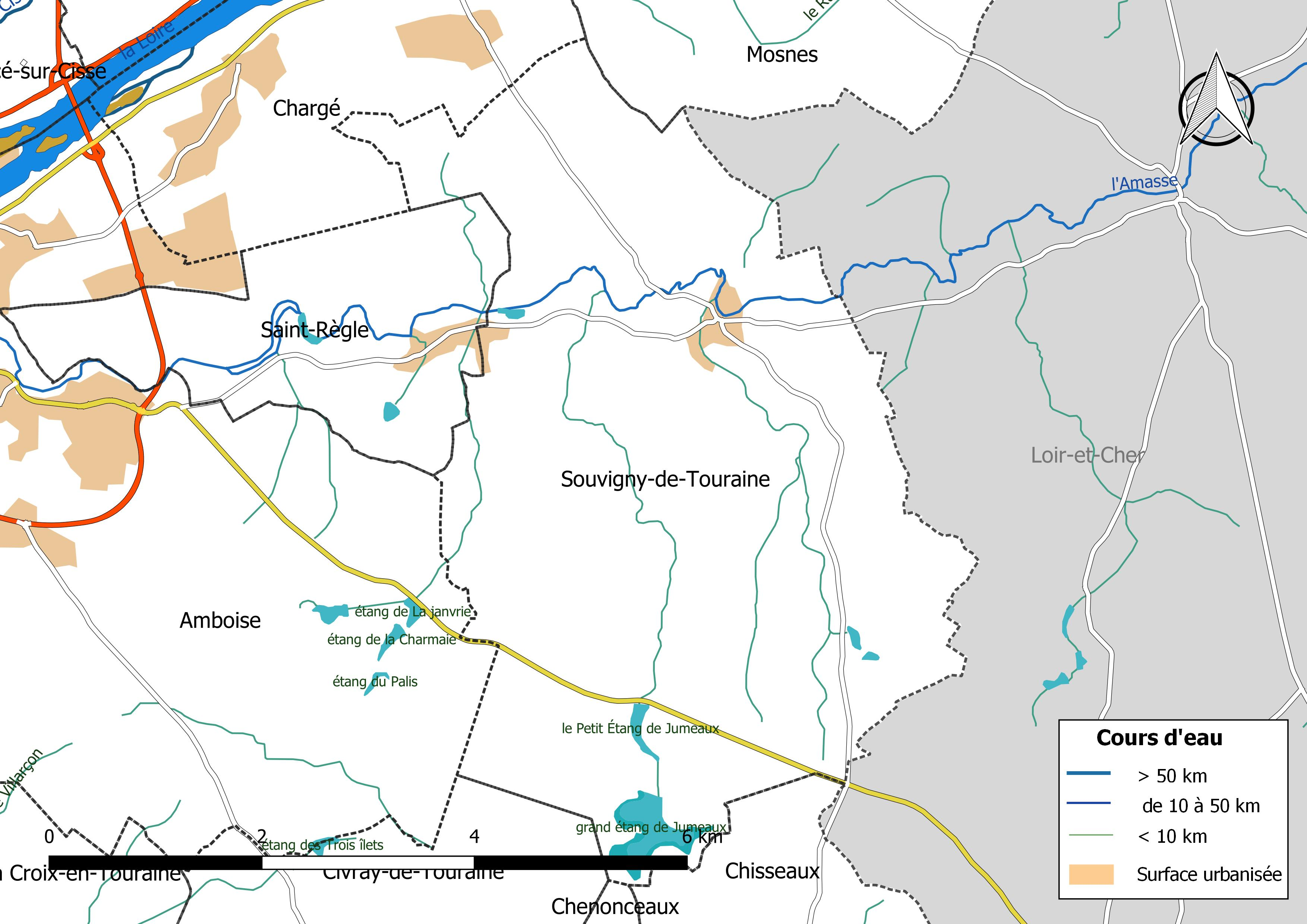 Carte du réseau hydrographique de la commune de Souvigny-de-Touraine (France).